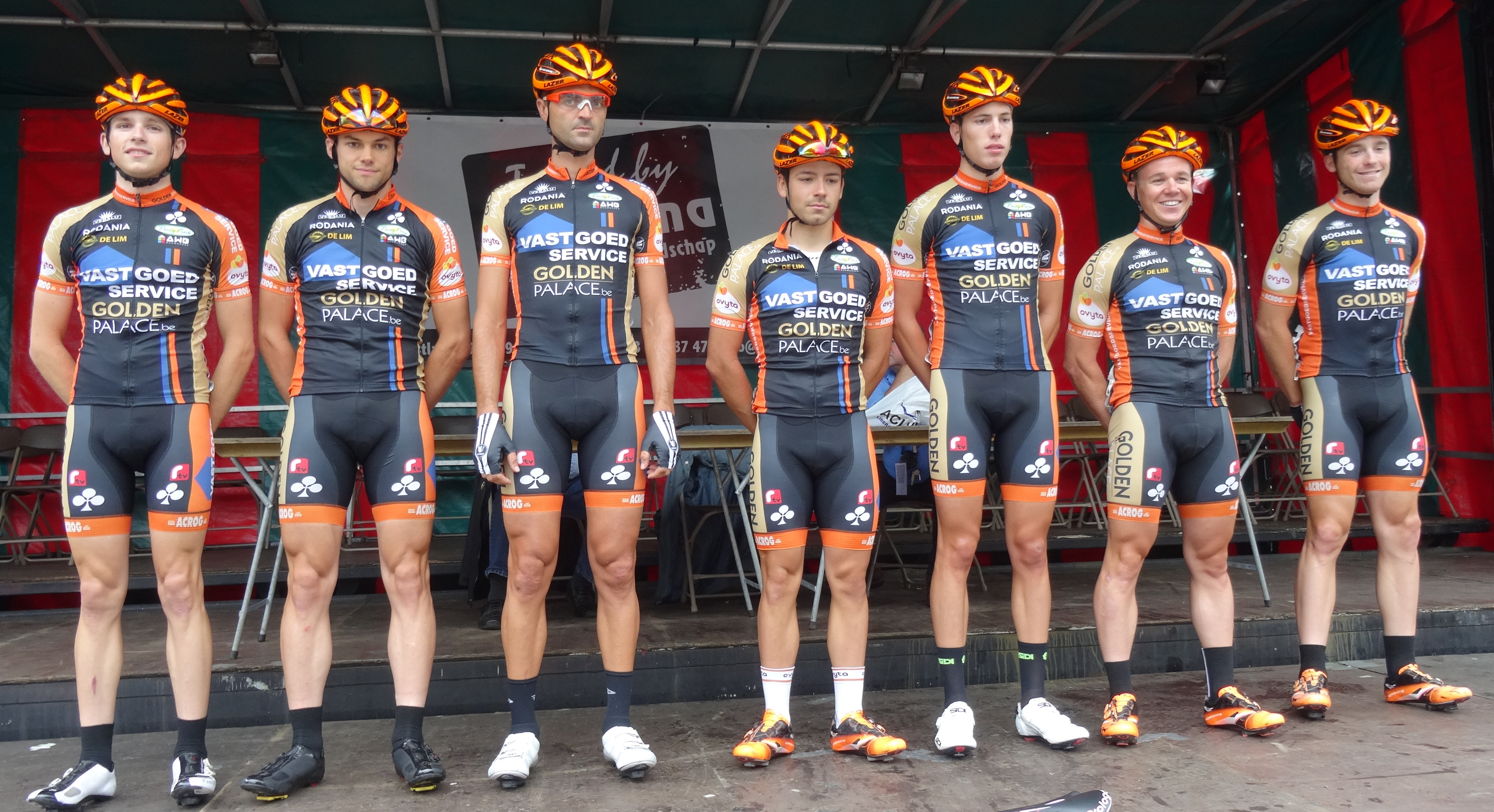 Reportage photographique réalisé le dimanche 10 août à l'occasion du départ et de l'arrivée de la Flèche du port d'Anvers 2014 à Merksem (Anvers), Belgique.